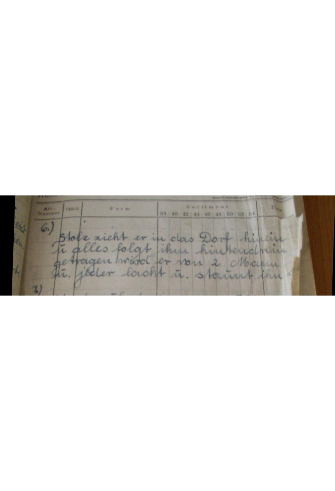 Ausschnitt aus der Kerwebibel von 1947 mit Originalschrift Kerwelied